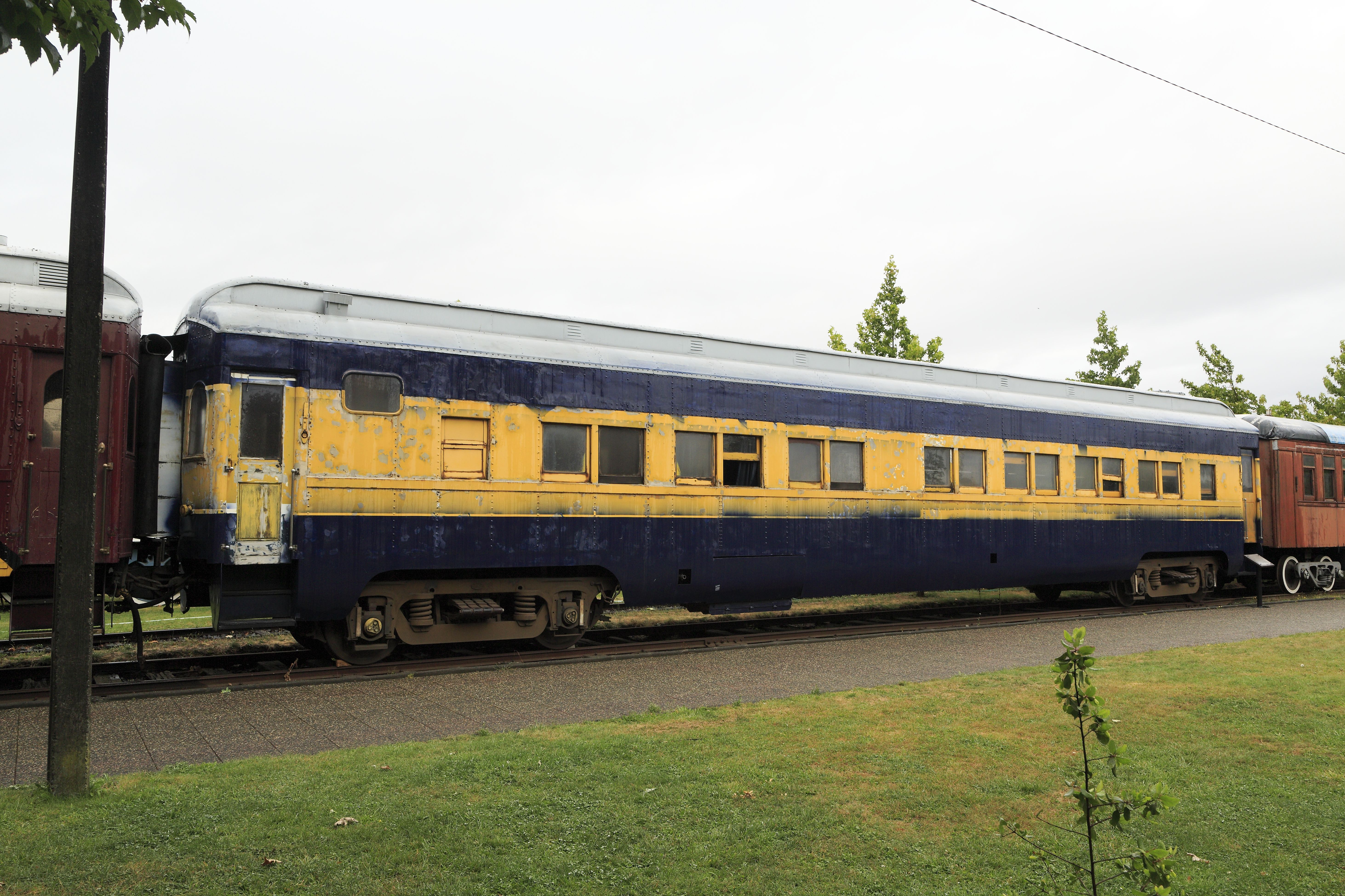 Großraumschlafwagen für das chilenische Breitspurnetz, 1935 von Linke-Hofmann-Busch geliefert. Auf der im Bild linken Seite befindet sich ein Großraum mit offenen Längsbetten, auf der rechten vier Zweibettabteile, ebenfalls in Längsanordnung. Der Wagen bietet 44 Sitz- und nur 20 Bettplätze. Seit 2003 im Museum.